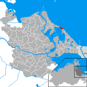 Koserow, Landkreis Ostvorpommern, Mecklenburg-Vorpommern